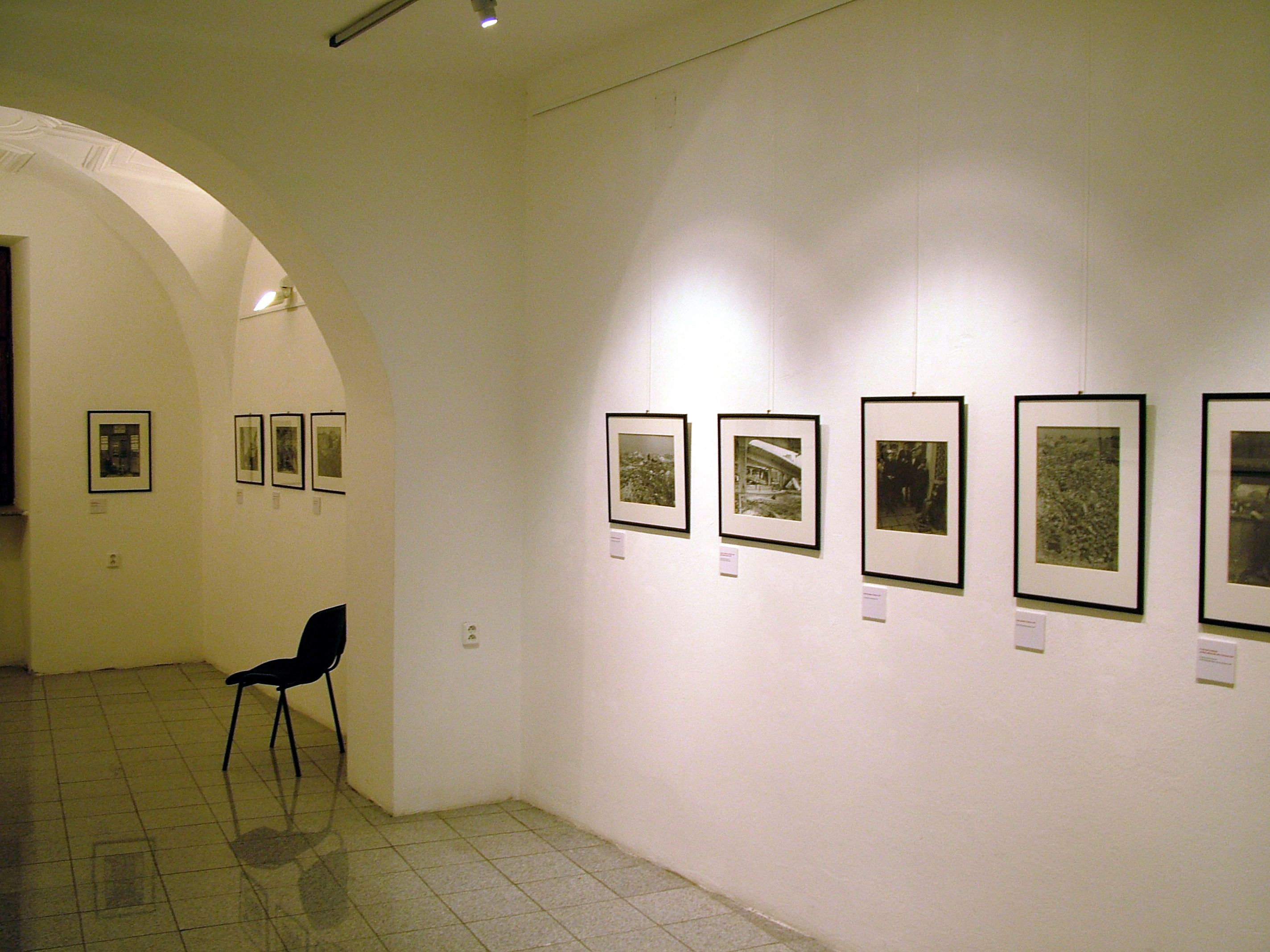 Výstava fotografií, Středoevropský dům fotografie (Stredoeurópsky dom fotografie), listopad - prosinec 2011